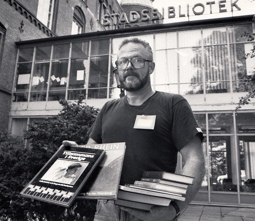 En bibliotekarie med utsorterade böcker som ska säljas. Malmö Stadsbibliotek 1988.